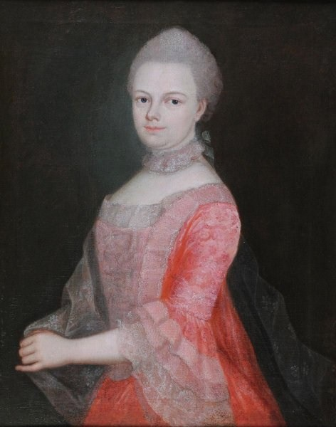 Porträt Lucia Hedwig von Lehwaldt, geborene von Zeppelin (* 1738; † Juli 1768), 1. Ehefrau des preußischen Generalleutnants Baron Wenzeslaus Hans Christoph von Lehwaldt (* 18. Februar 1717 auf Gut Ublick bei Johannisburg in Ostpreußen; † 27. Dezember 1793)